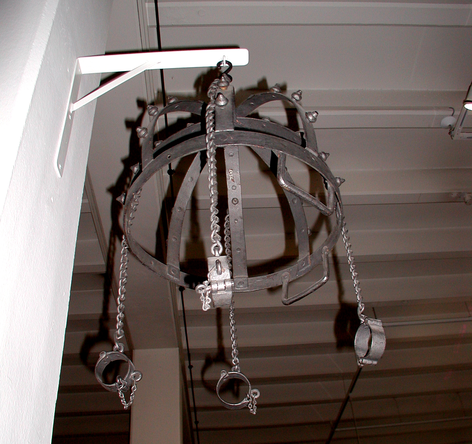 Köln, Zeughaus. Mittelelterliches Foltergerät (Sponhaube?).